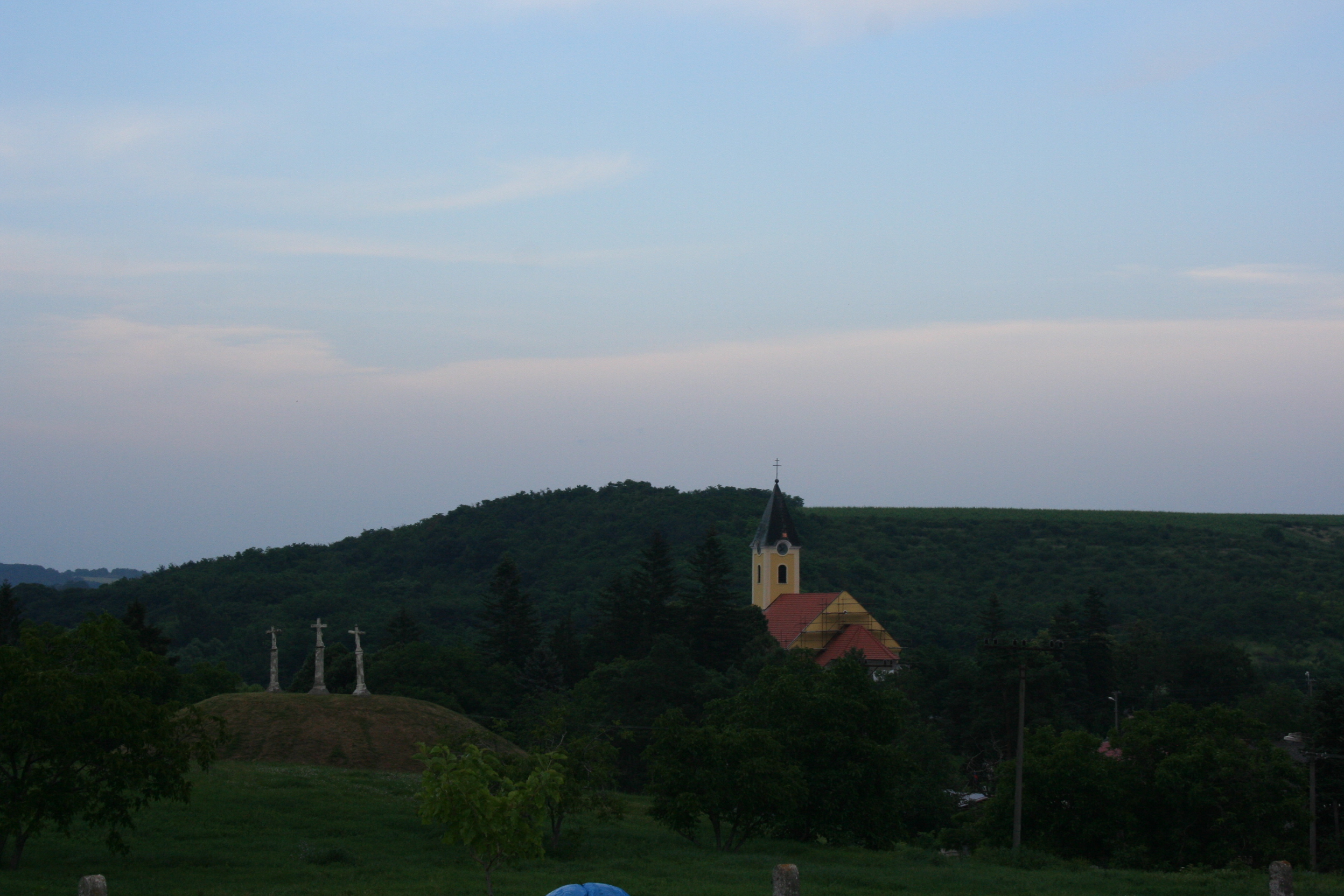 Báb község